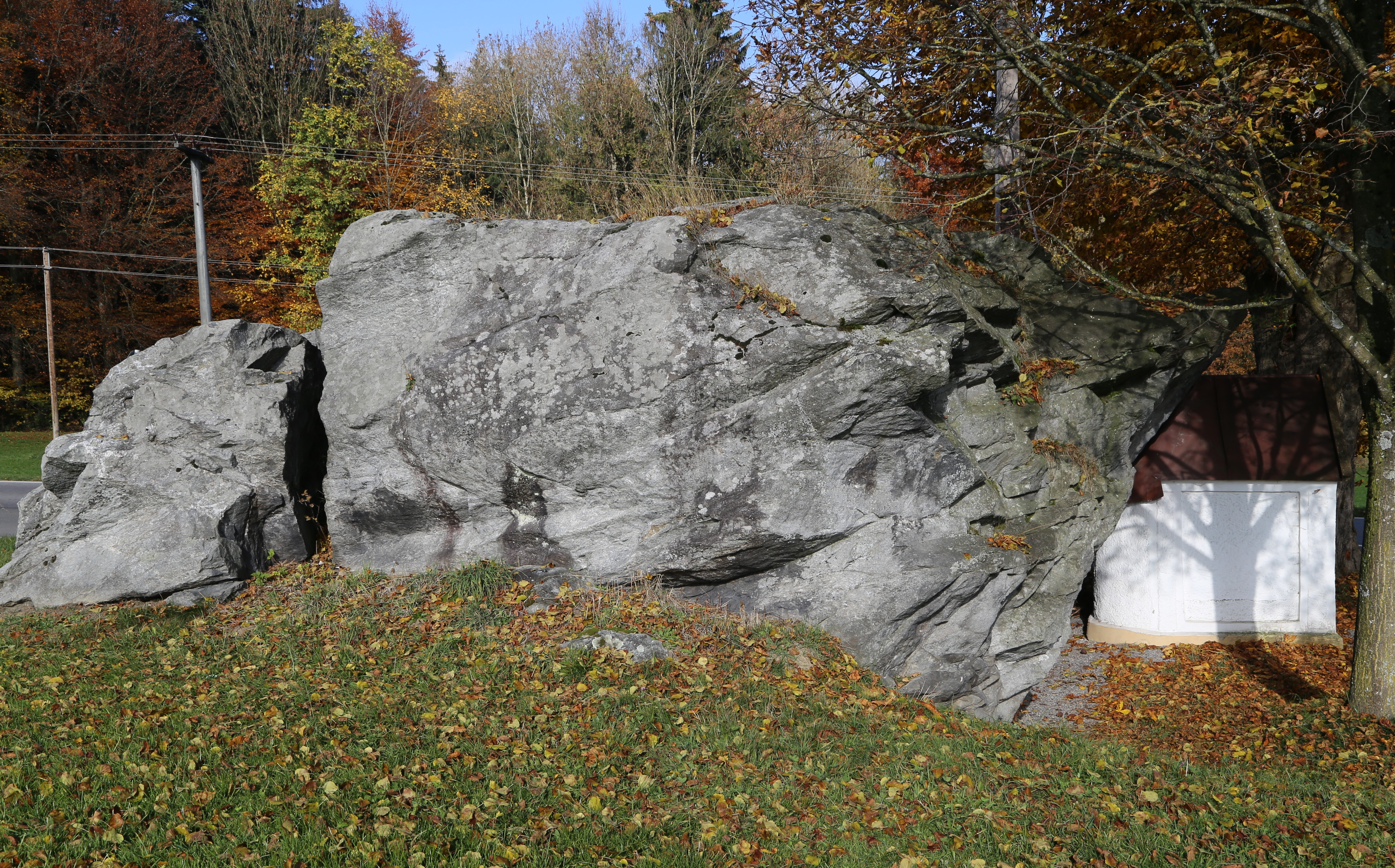 Findling Steinwies, Bad Feilnbach, Kapelle, kleiner Satteldachbau mit schmiedeeiserner Gittertür, Ende 19. Jh.; neben dem Großen Stein.